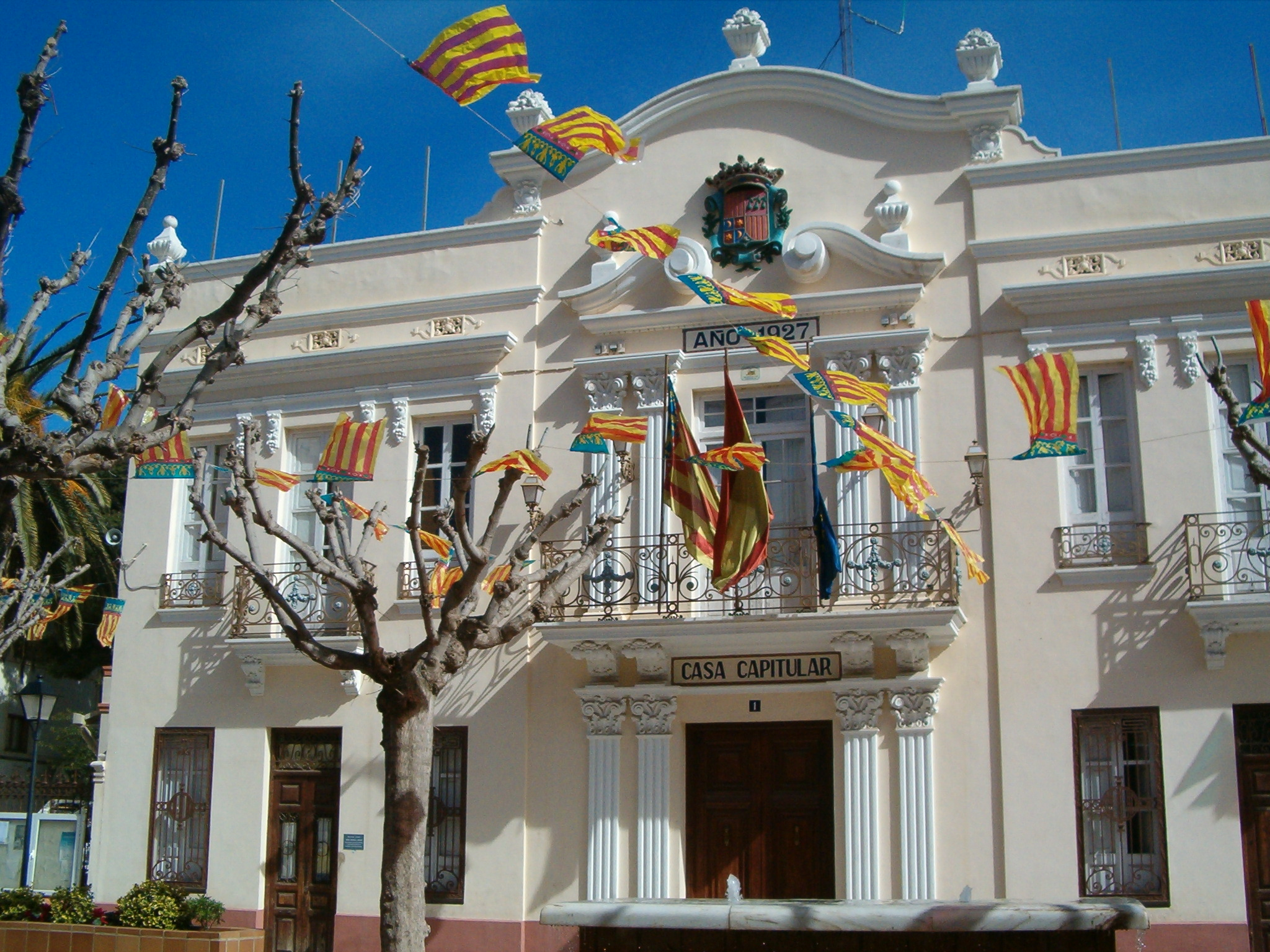 Fachada del Ayuntamiento de Tavernes Blanques (Valencia, España)con la indicación Casa Capitular y el año de construcción, 1927.